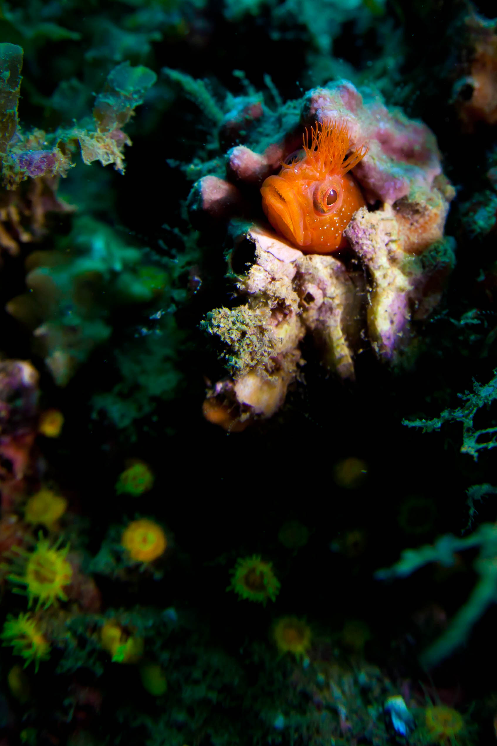 Neoclinus bryope aka コケギンポ